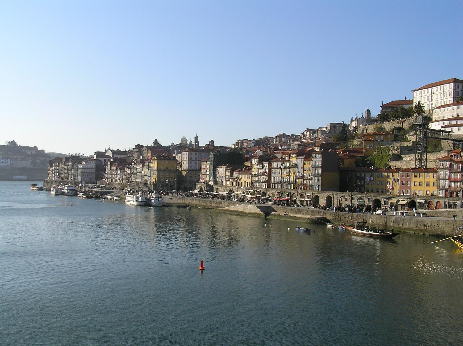 Fotografia da Ribeira do Porto. Picture of the Ribeira do Porto.